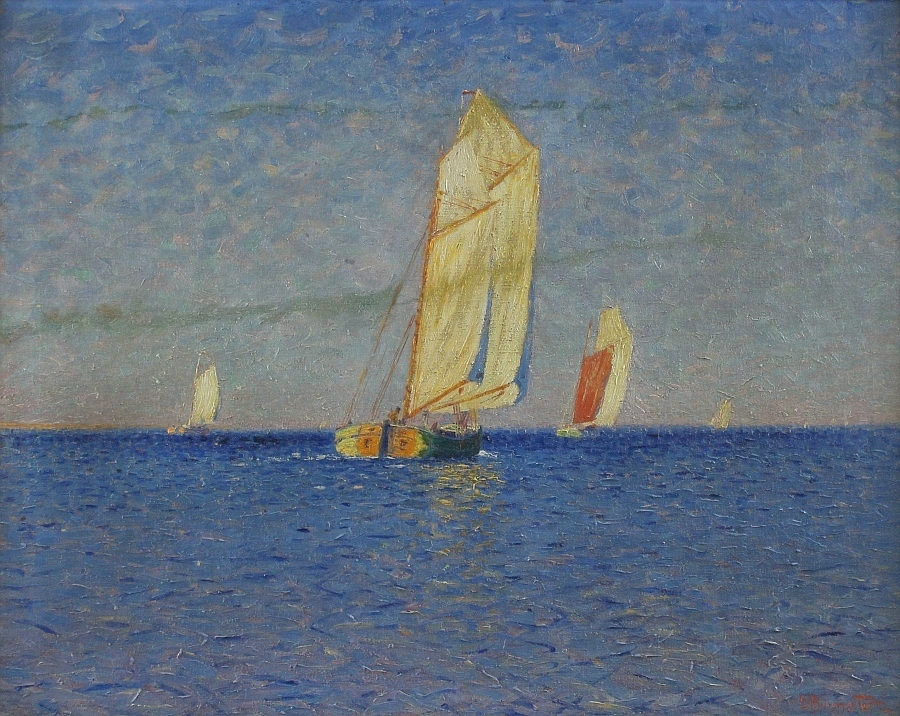 Segler in ruhiger See. Öl auf Leinwand, 74 x 92 cm, unten rechts signiert "G. Burmester"